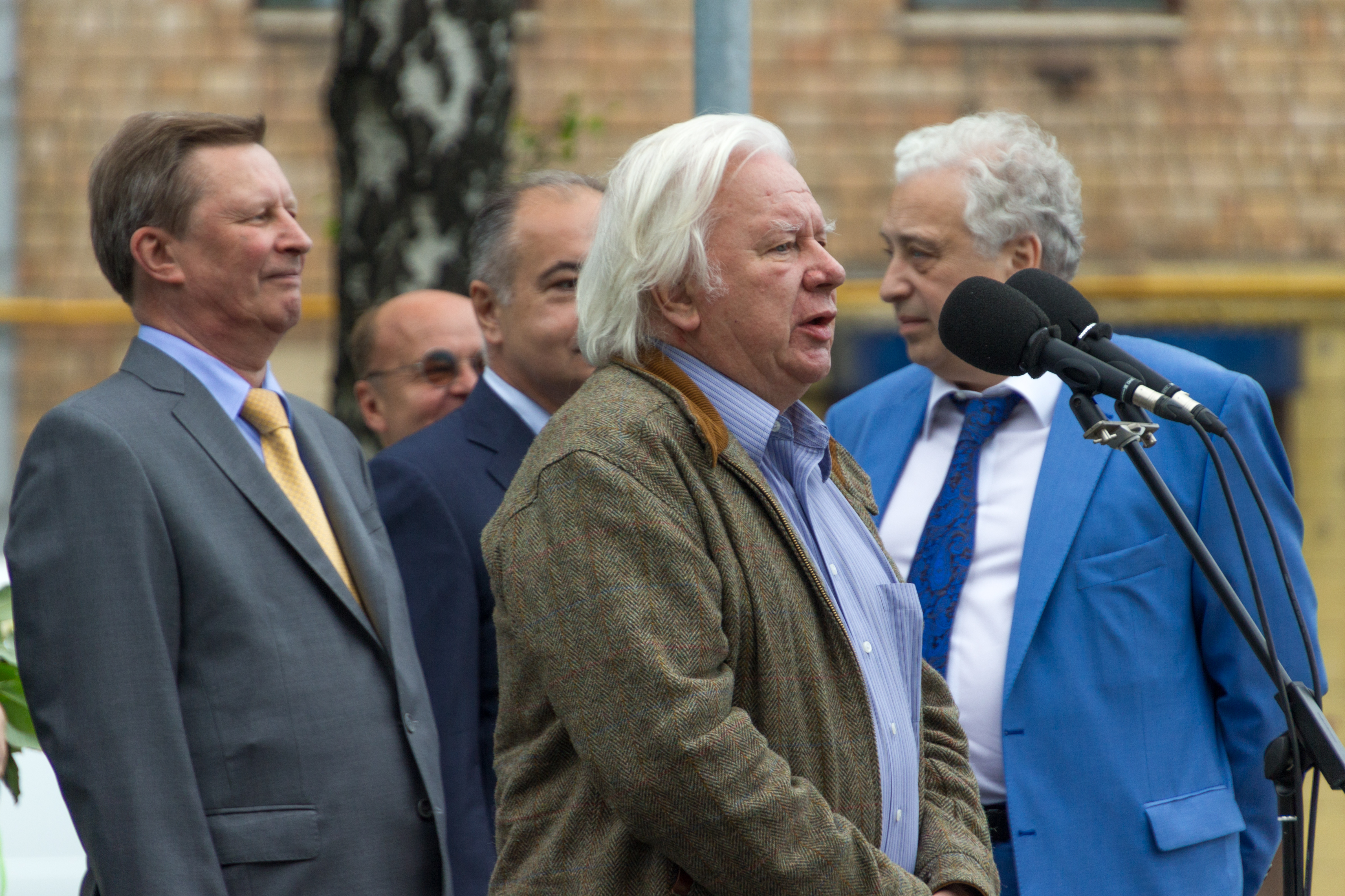 На открытии памятника А.М. Прохорову 9.07.2015